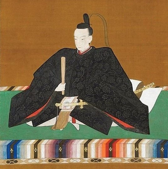 毛利斉広の肖像(部分)。